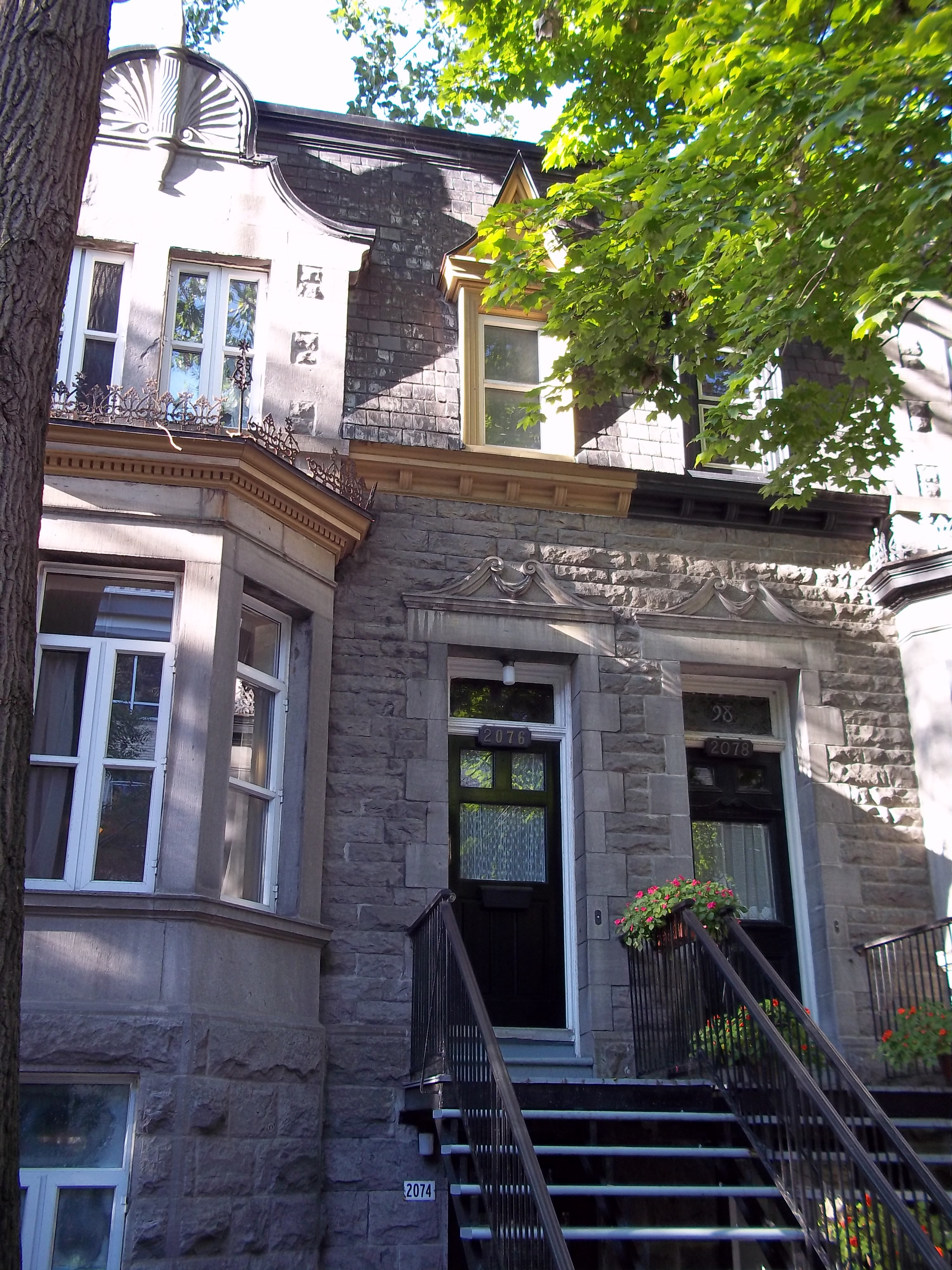 Maisons Charles-Sheppard. À gauche, celle du 2074-2076, rue Jeanne-Mance. À droite, celle du 2078, rue Jeanne-Mance, Montréal.